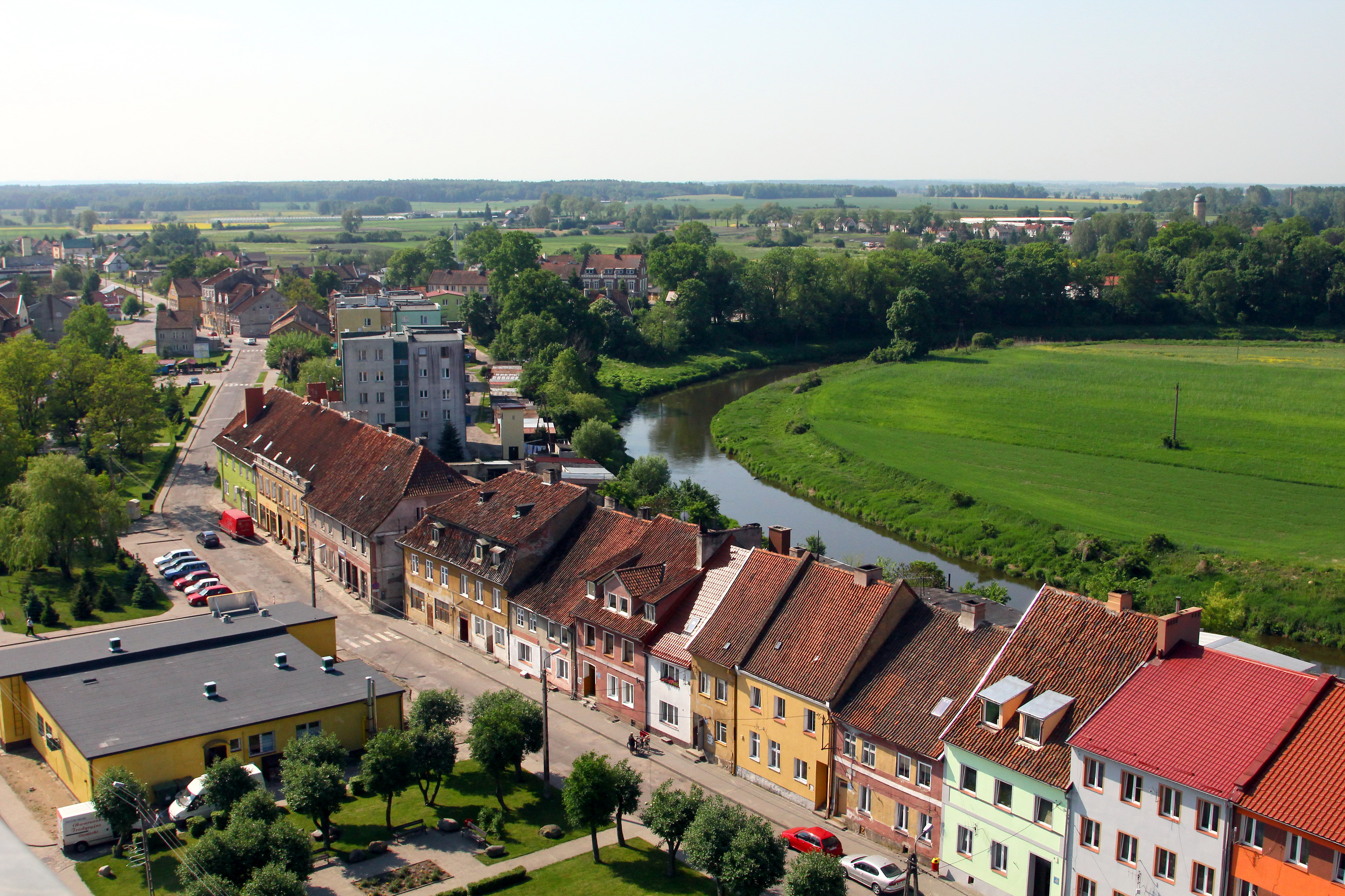 Widok na Sępopol z wieży kościoła św. Michała Archanioła.